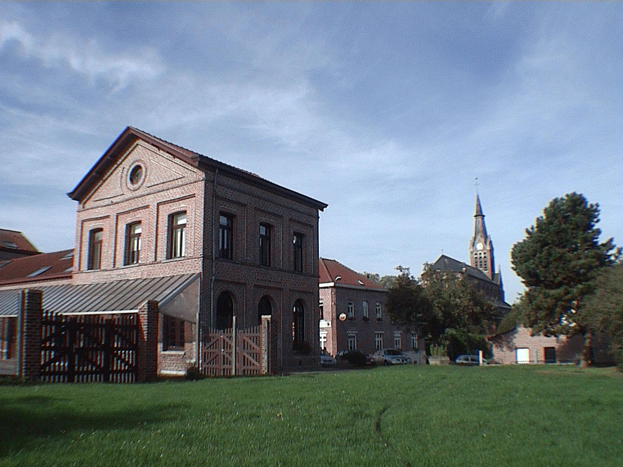 L'ancien bâtiment voyageurs de la gare frontière de Godewaersvelde, fermé en 1970 et devenu une école.